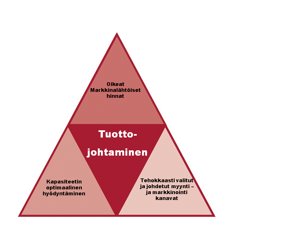 Tuottojohtamisen peruselementtien kuvaus tuottojohtamisen Wiki tietopohjaa varten